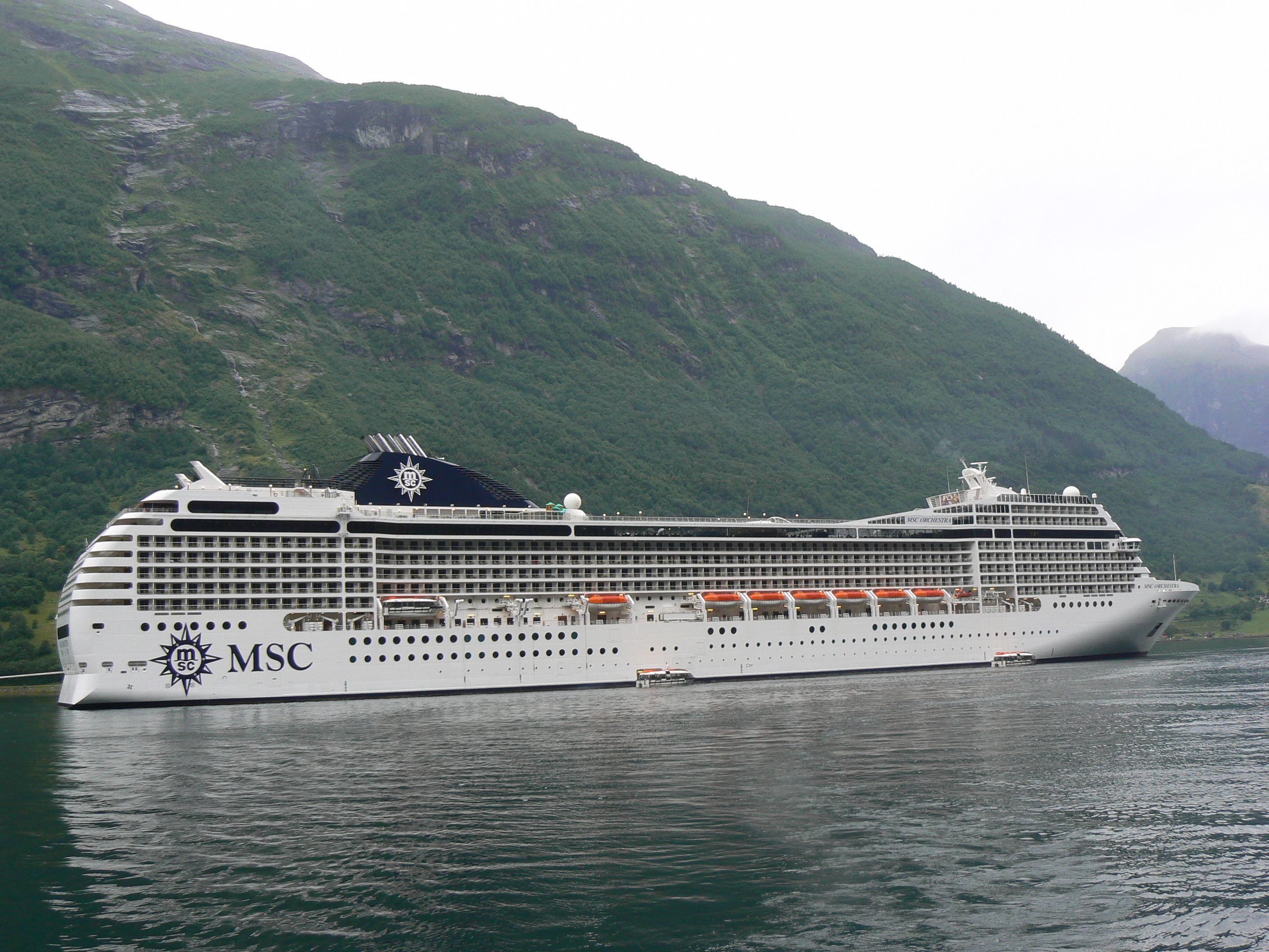 The "MSC Orchestra" at the Geirangerfjord in July 2010